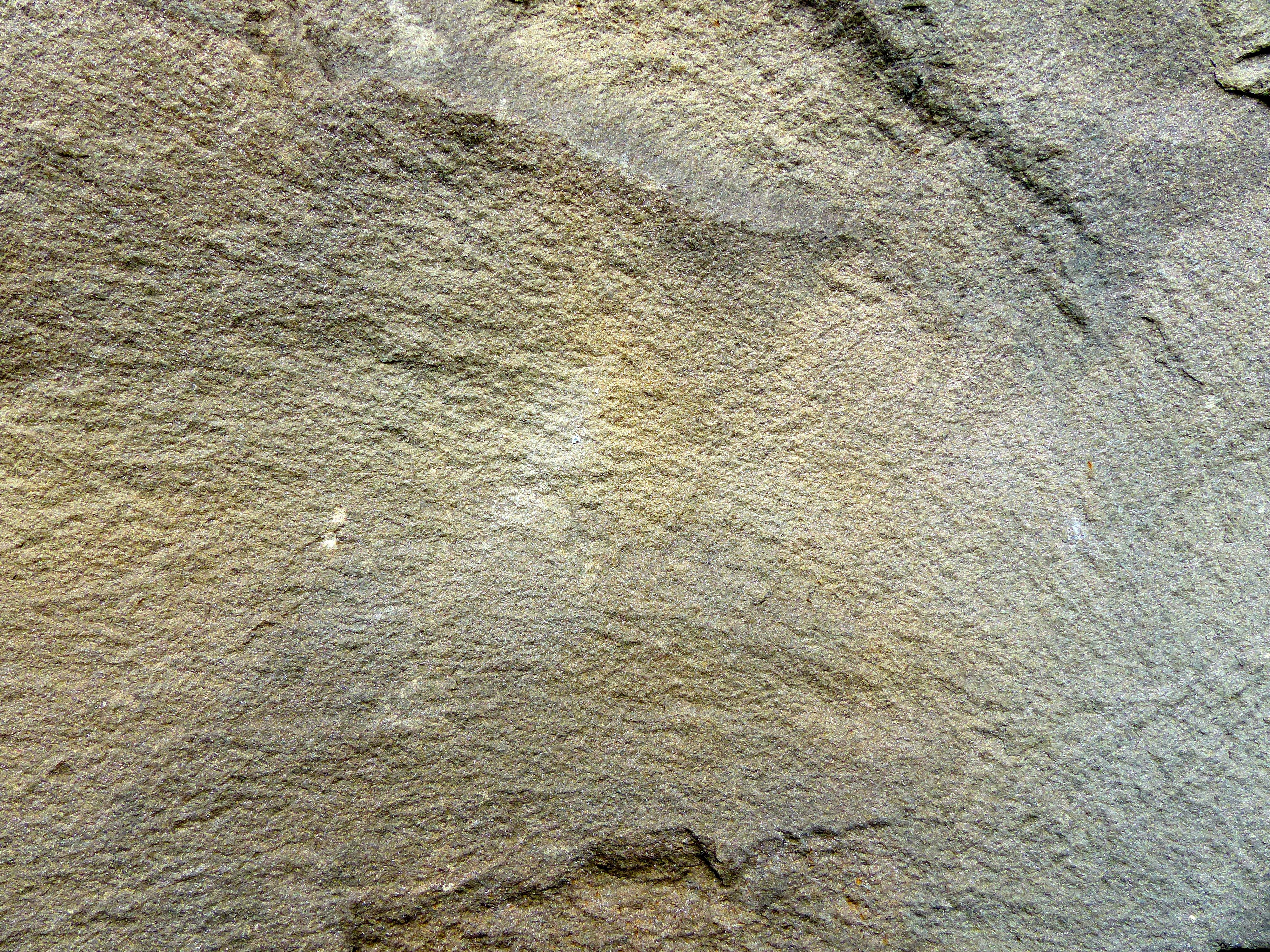 Grauwacke: Werkstein am Aachener Rathaus